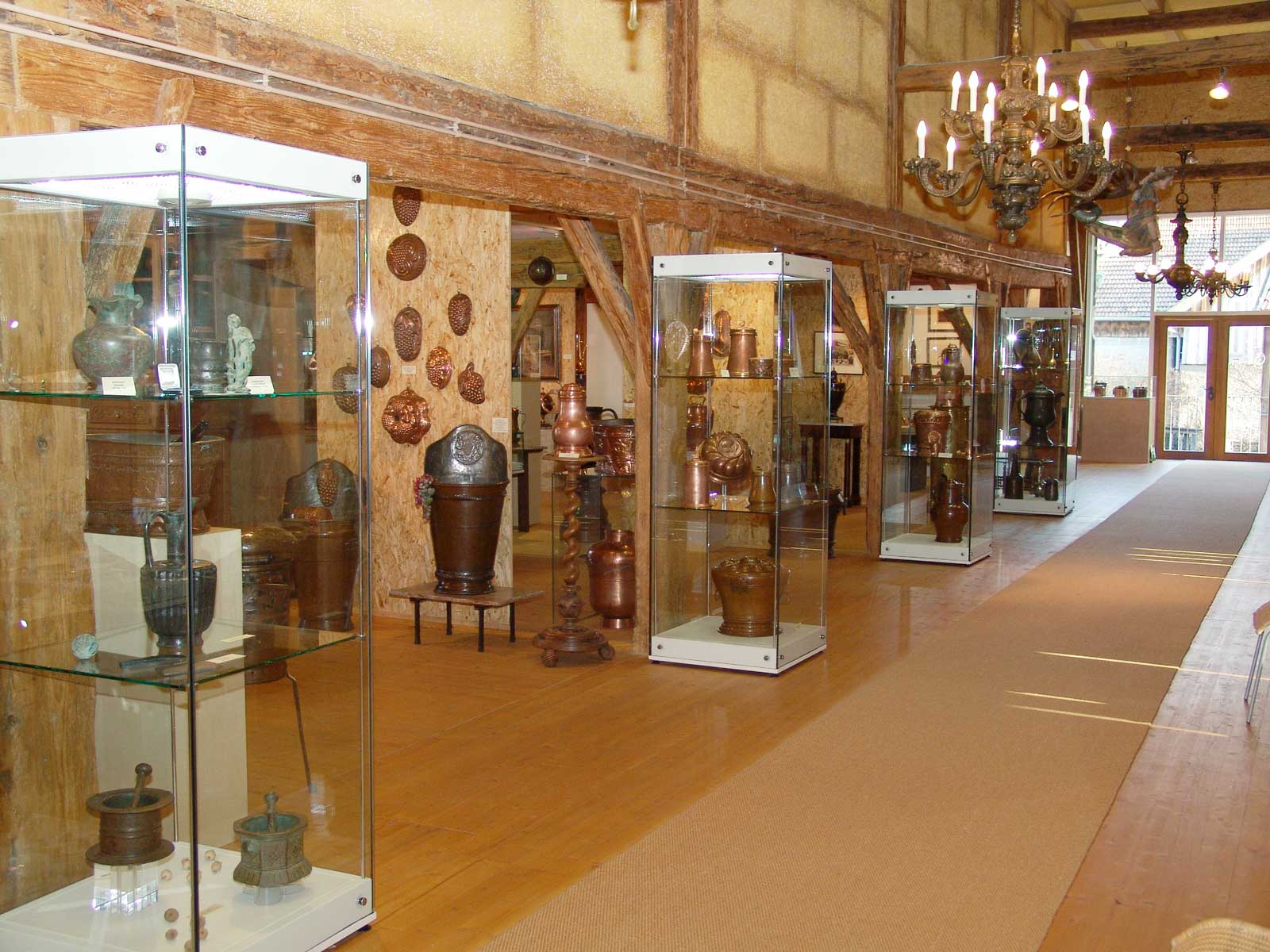 Das Bild zeigt einen Blick in einen der Ausstellungsräume des Kupfermuseums in Fischen am Ammersee